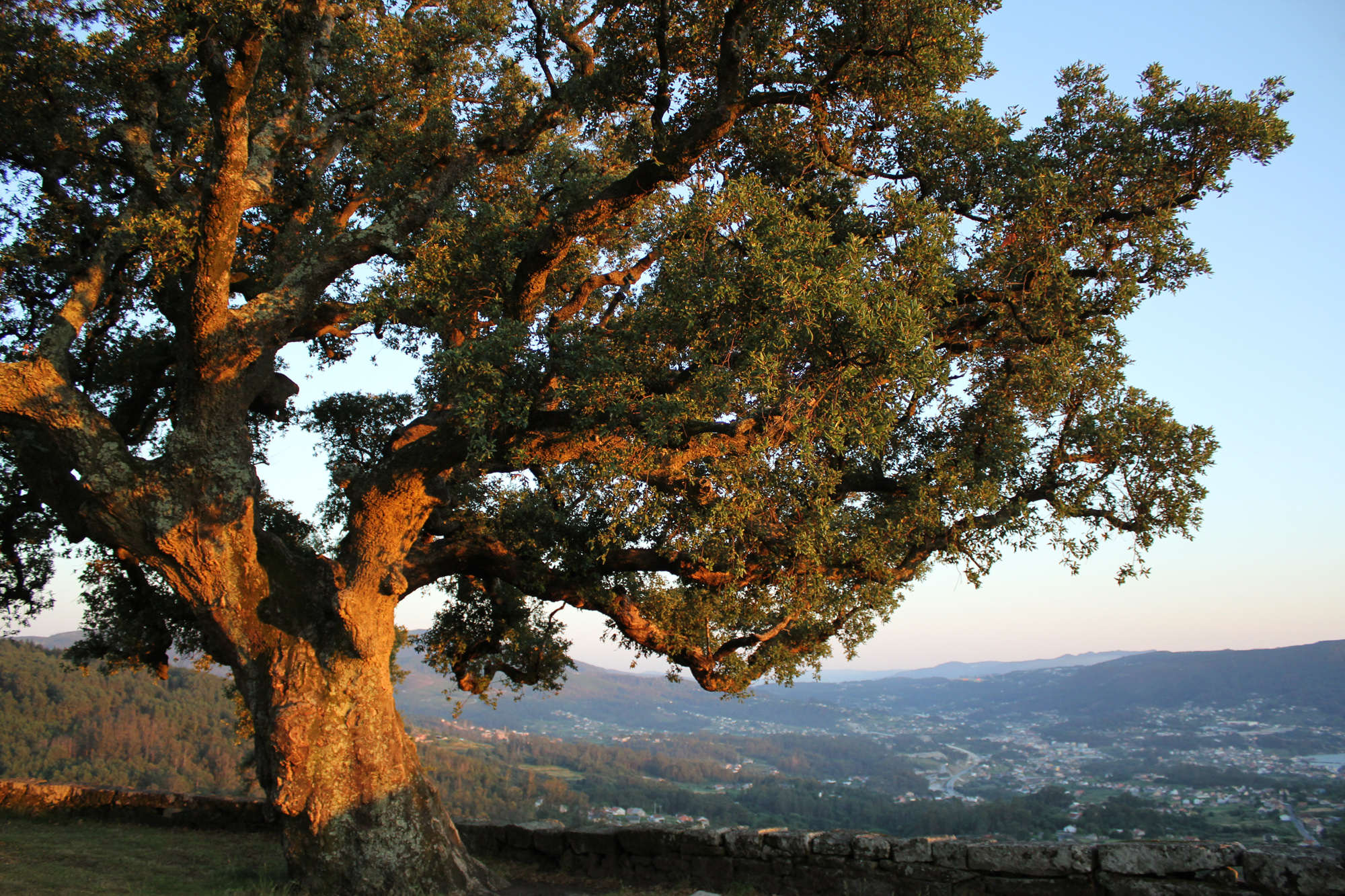 Un viejo alcornoque en el Monte de la Peneda, en Sotomayor (Pontevedra, España). Vigo estuary An old cork oak on the Mount of Peneda in Sotomayor (Pontevedra, Spain).